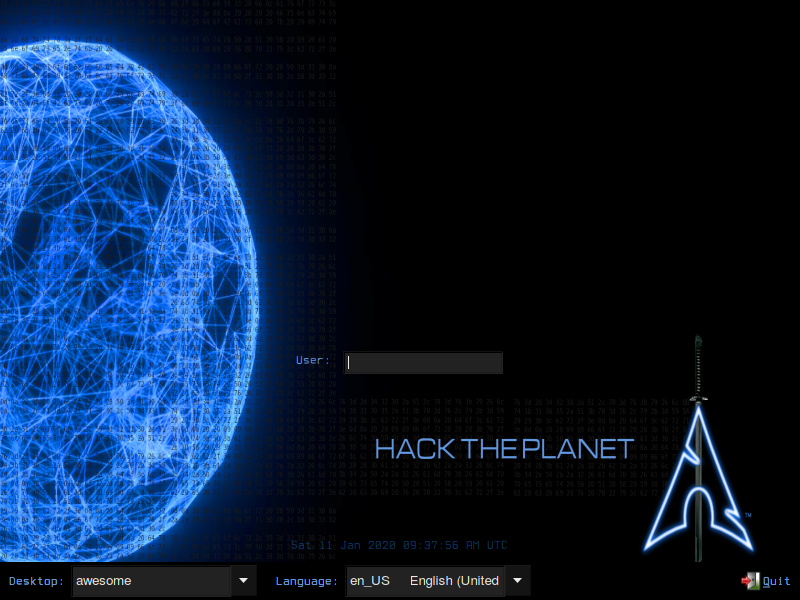 Der Log in-Bildschirm von BlackArch Linux.